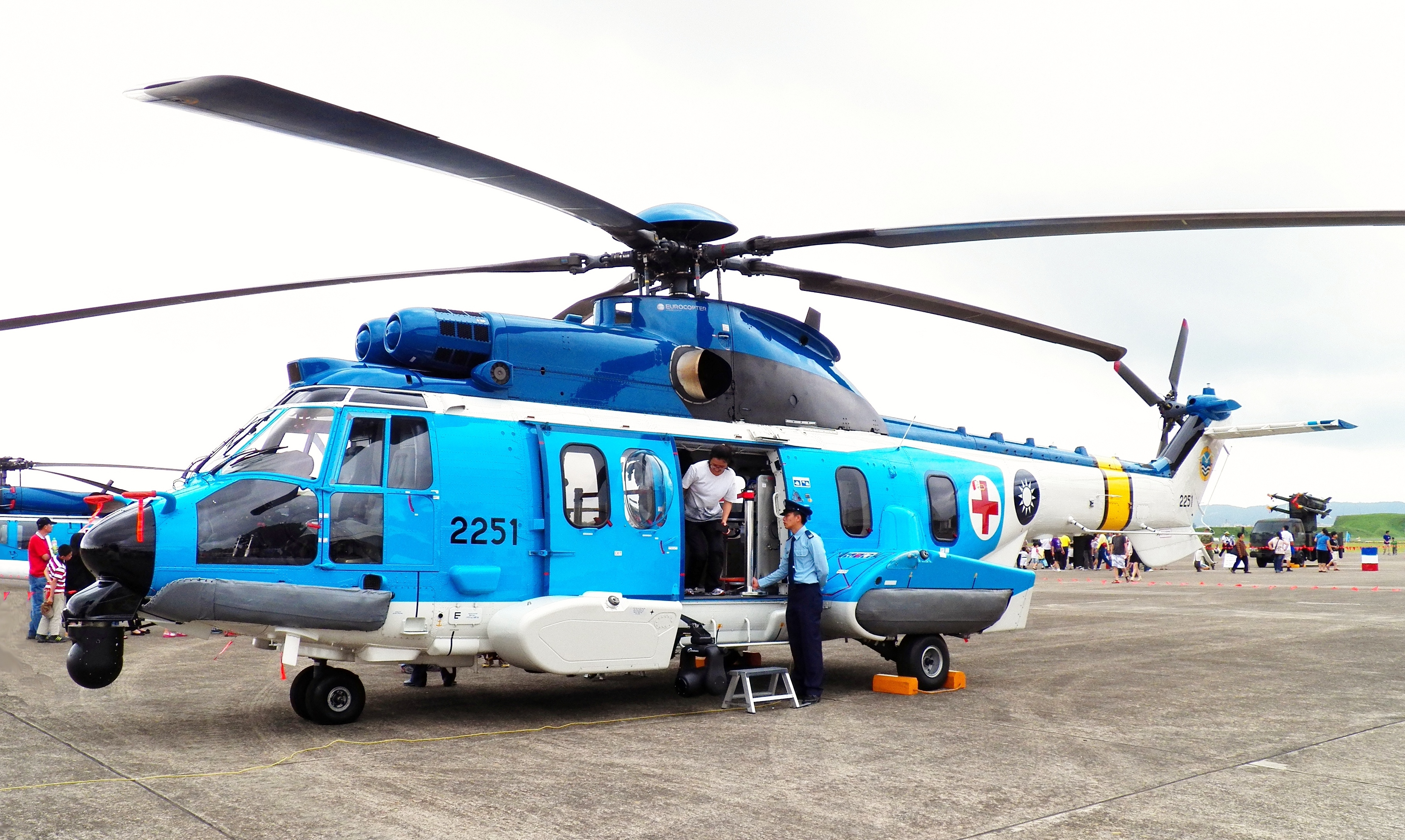 2012年空軍新竹基地營區開放活動，公開機艙參觀的EC225救難直昇機，自右側機門進入的遊客，從左側離去。